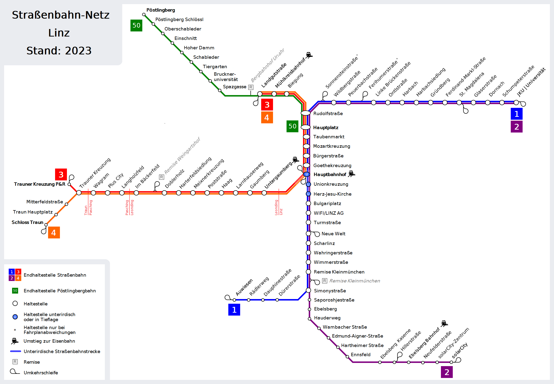 Netzplan der Linzer Straßenbahn